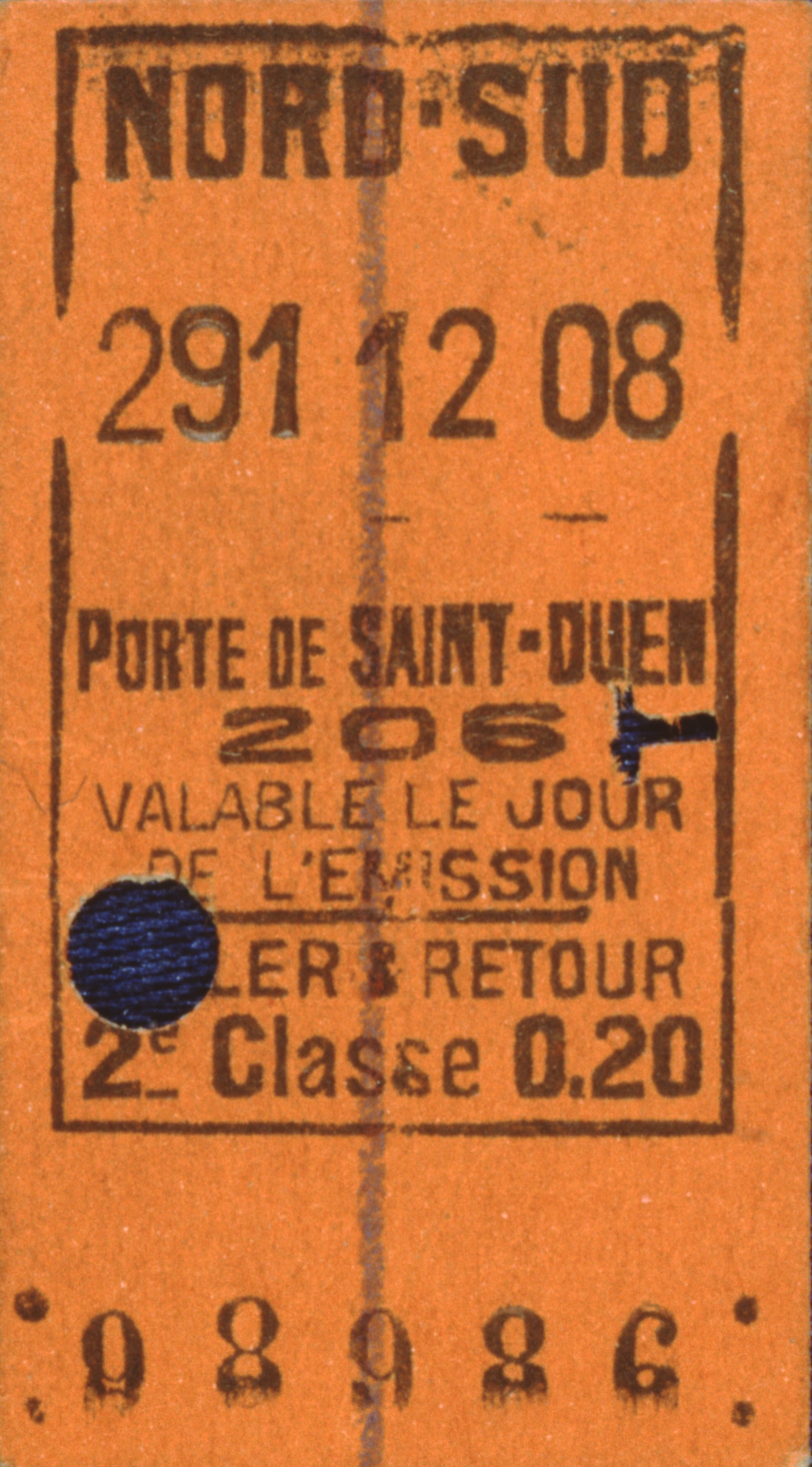 Ticket de la compagnie Nord-Sud émis le 291e jour (17 octobre) de 1912 entre 8 et heures. 98986e ticket émis par la machine.